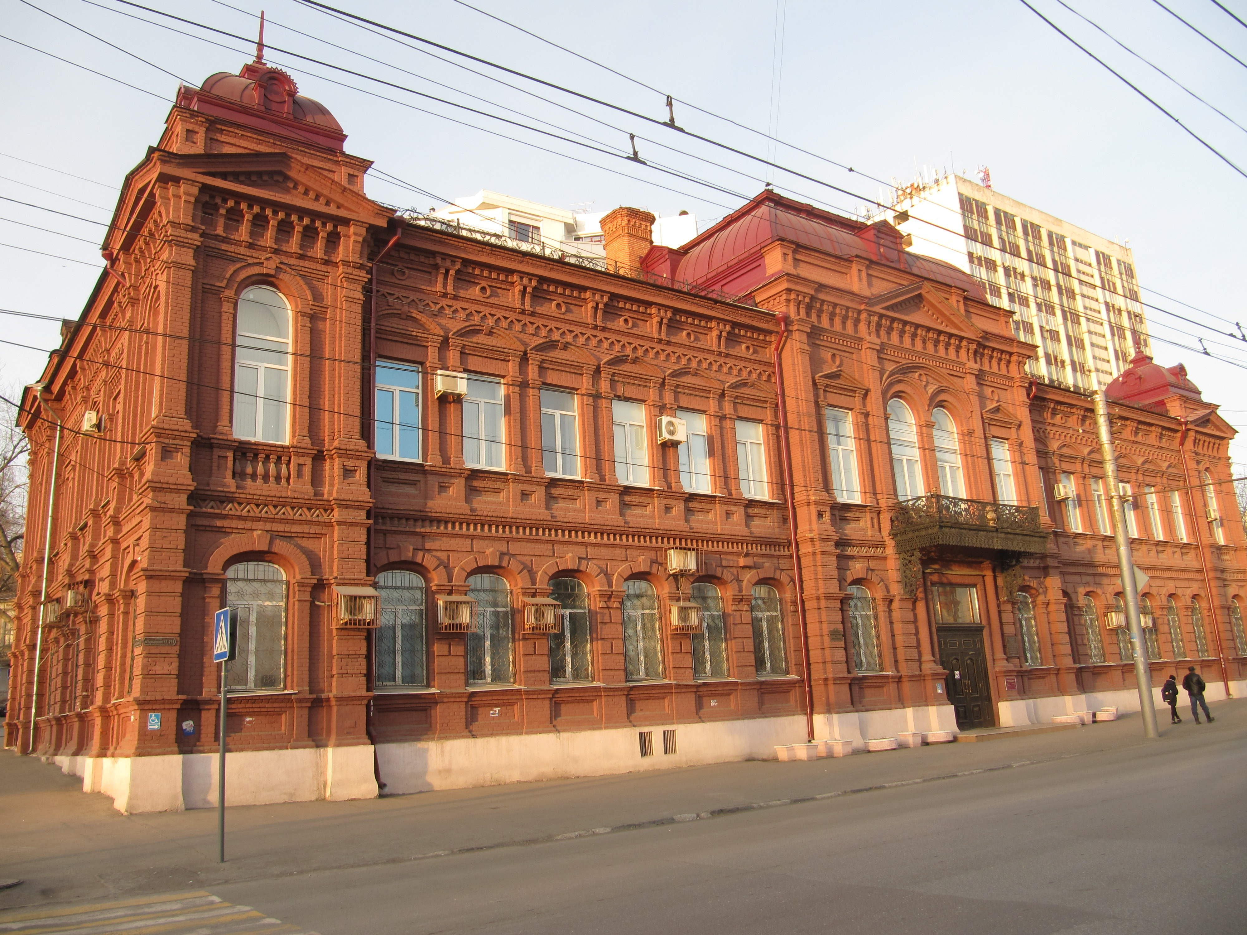 Медицинский колледж (бывшая Фельдшерская школа): улица Чернышевского, 151, Саратов, Саратовская область